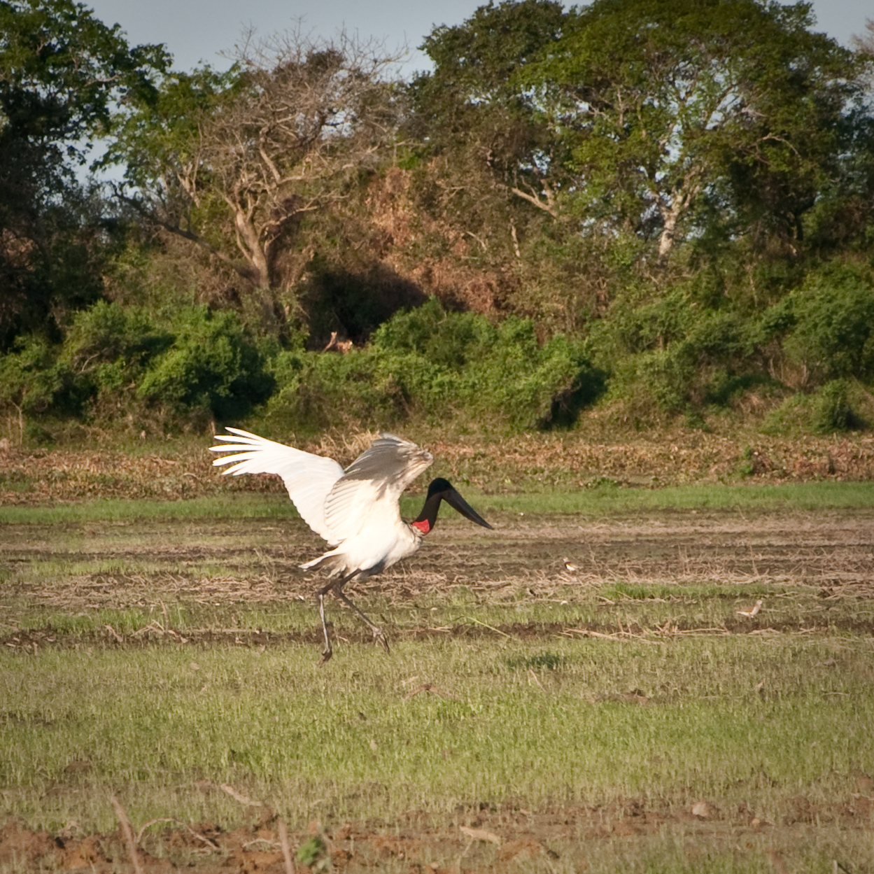 Jabirú en Reserva de biósfera Laguna Oca, Formosa, Argentina